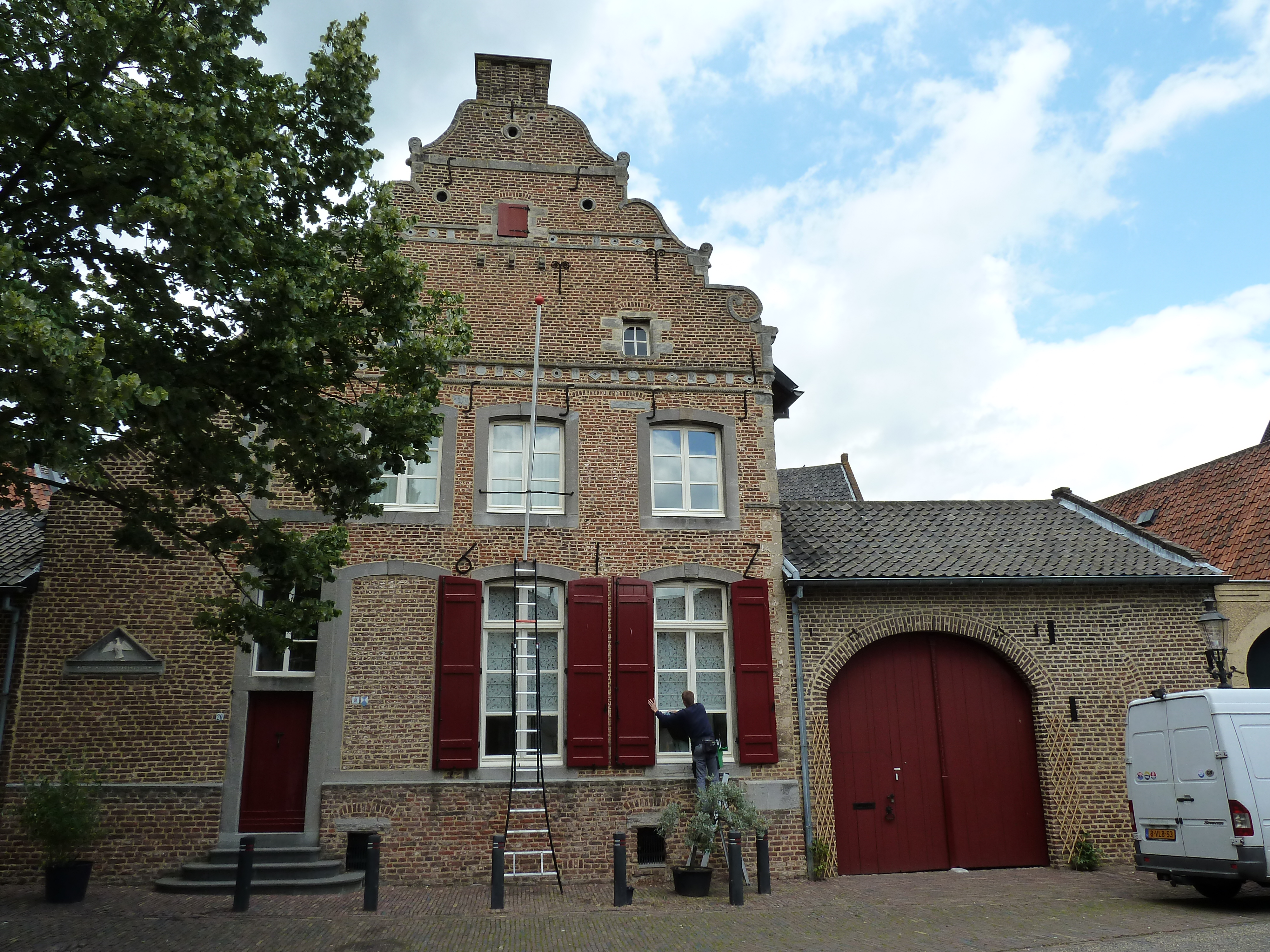 Grotestraat 20, Urmond, Limburg, Nederland